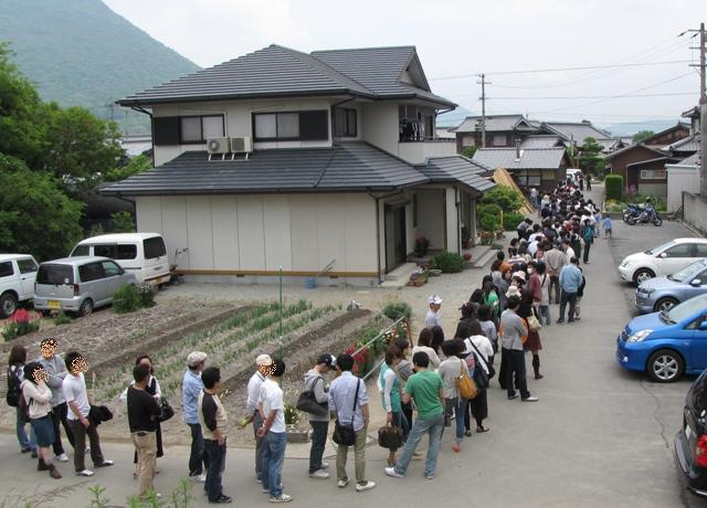 讃岐うどん有名店の大行列。香川県内の郊外エリア。